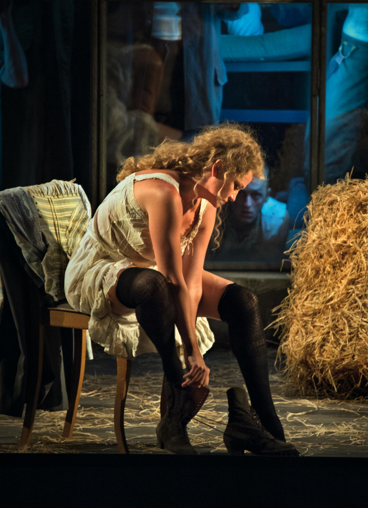 Salzburger Festspiele 2012 – Laura Aikin in Die Soldaten